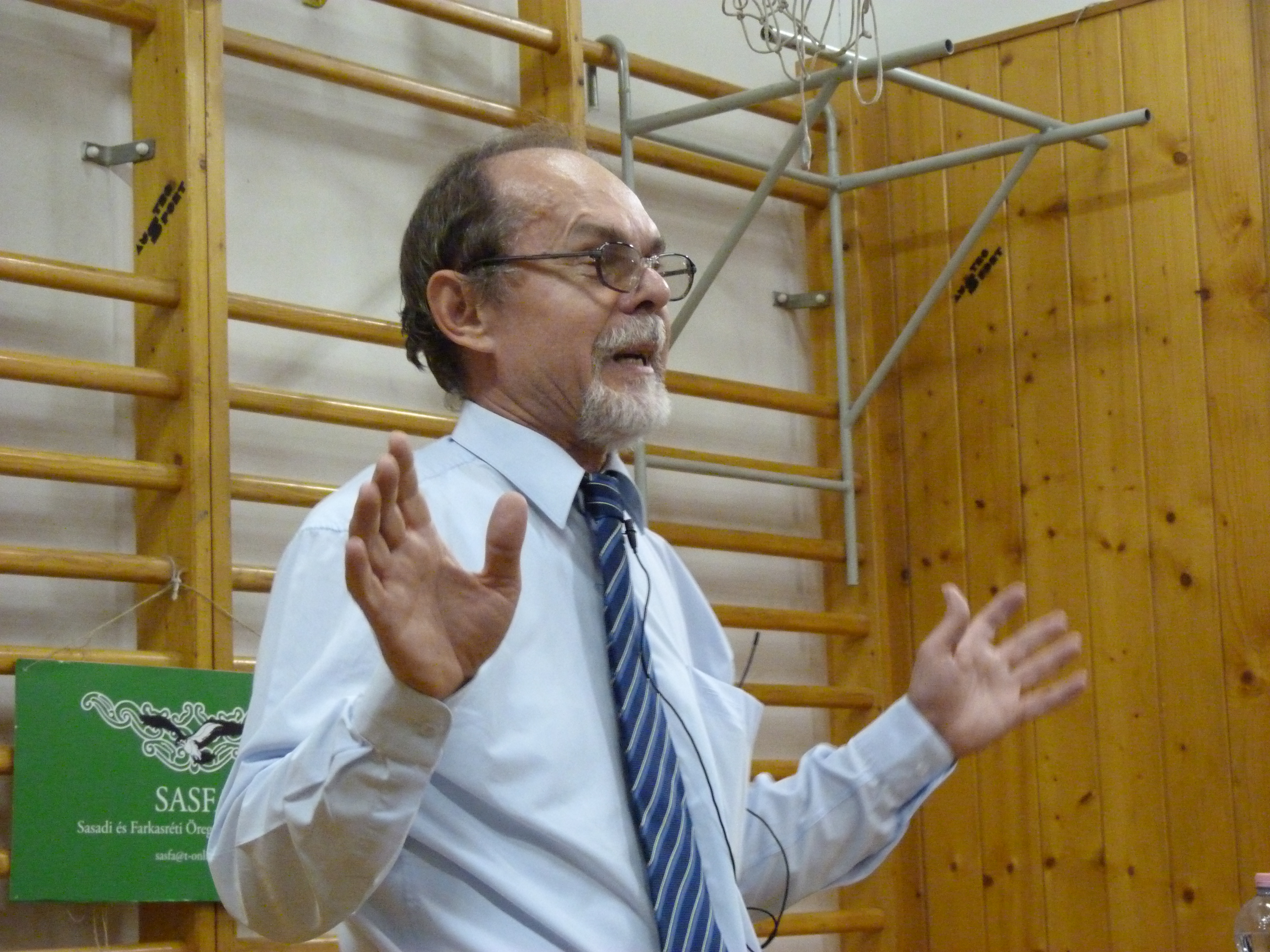 A felvétel 2012. november hó 28 -án, szerdán készült. Bogár László tanár út a Sashegyen, a Farkasréti Esték sorozat keretében tartott előadást a SASFA Sasadi és Farkasréti Öregdiákok Egyesülete) összejövetelén. A Farkasréti Általános Iskola Budapest XI.ker Érdi út 2 szám. Források: sasfa.hu, facebook: sashegy-vedo.hu, Sasfa Egyesület: mobil: +36 70 280 4089